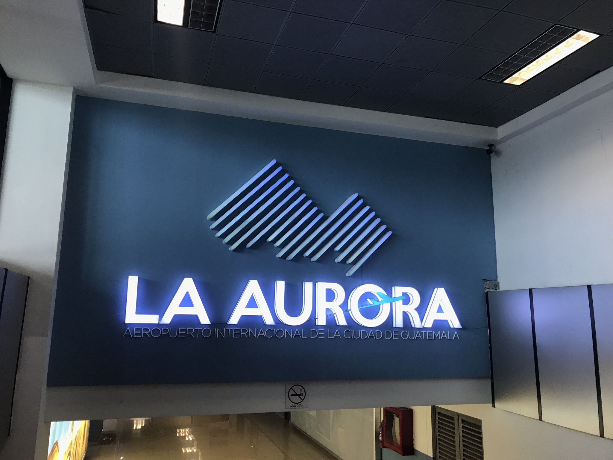 Bienvenida en el aeropuerto internacional La Aurora, Ciudad de Guatemala